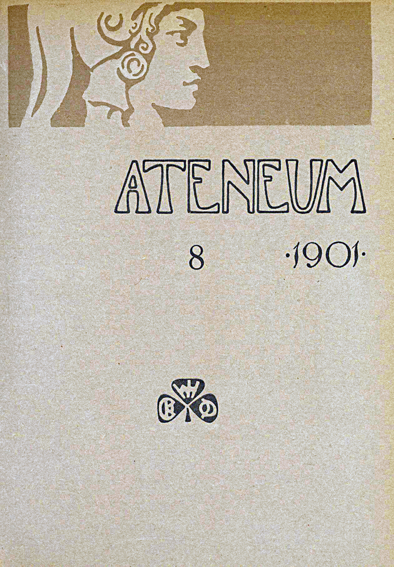 Ateneumin kansilehti vuodelta 1901.